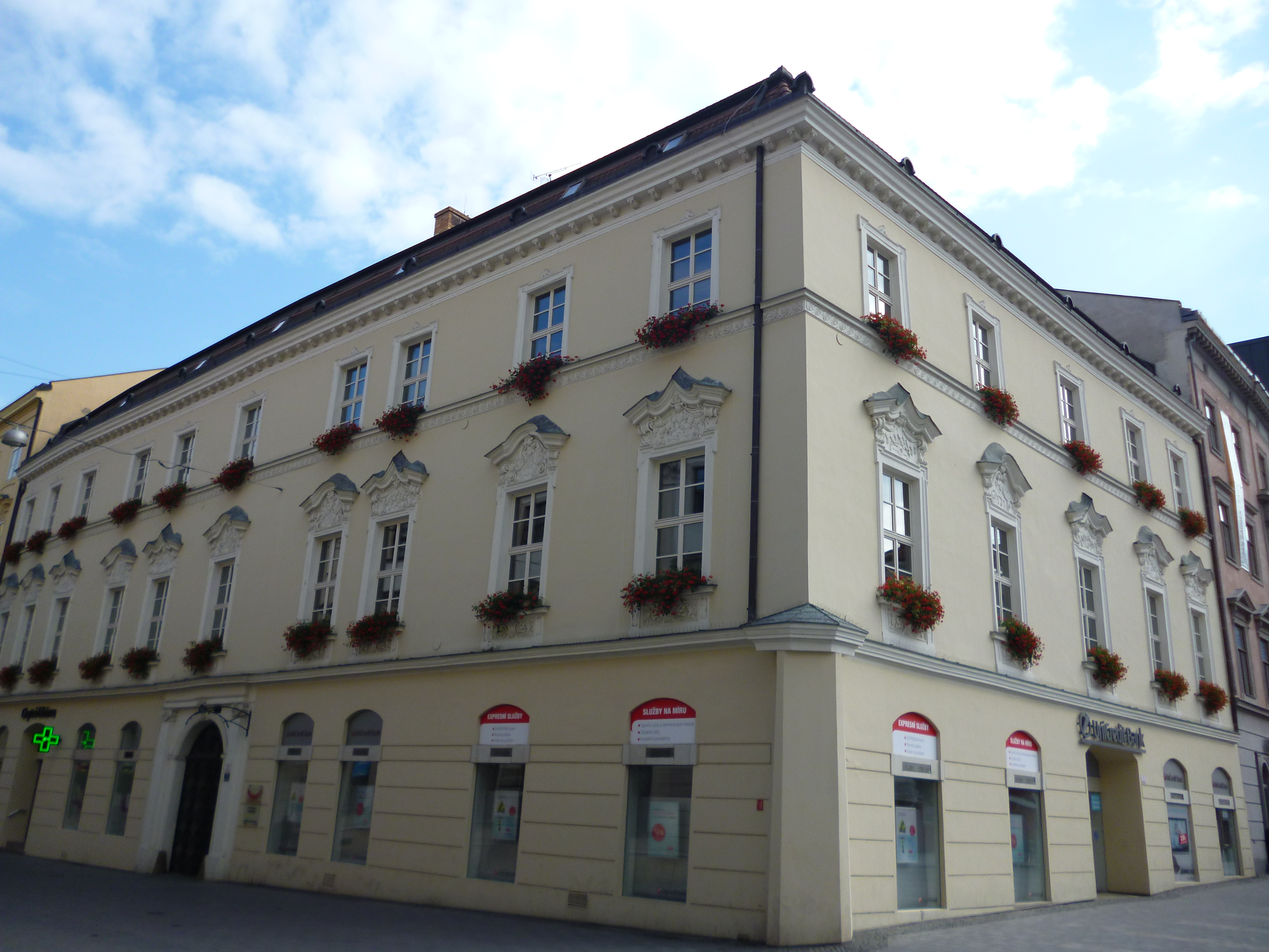 Palác Říkovských z Dobrčic (Brno), Brno - město, Kobližná 71/2, nám. Svobody, Brno